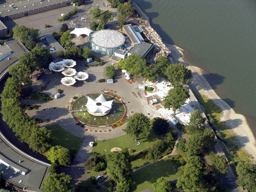 Tanzbrunnengelände aus der Luft aufgenommen